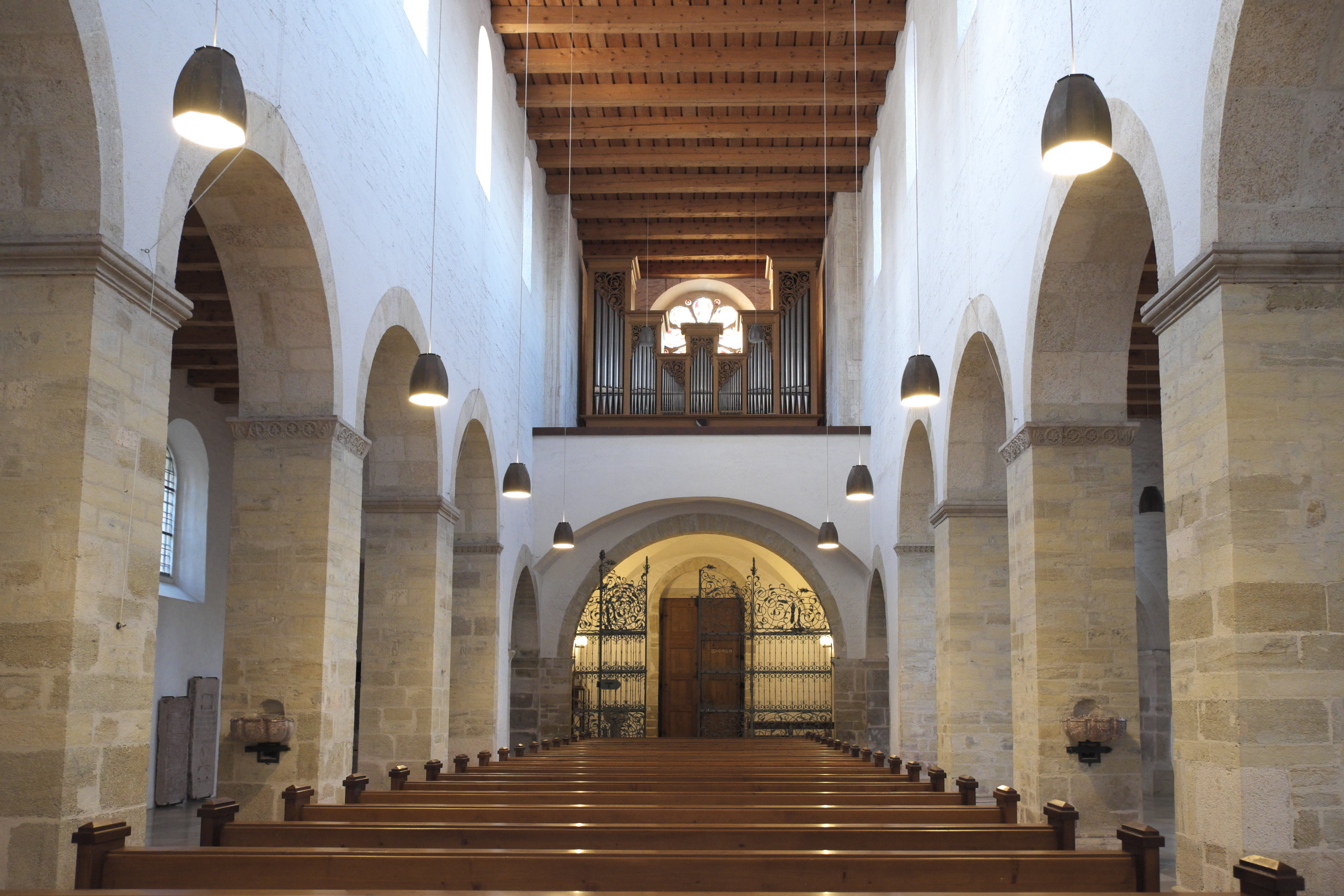 Alte katholische Pfarrkirche St. Peter in Straubing (Bayern/Deutschland), Innenraum